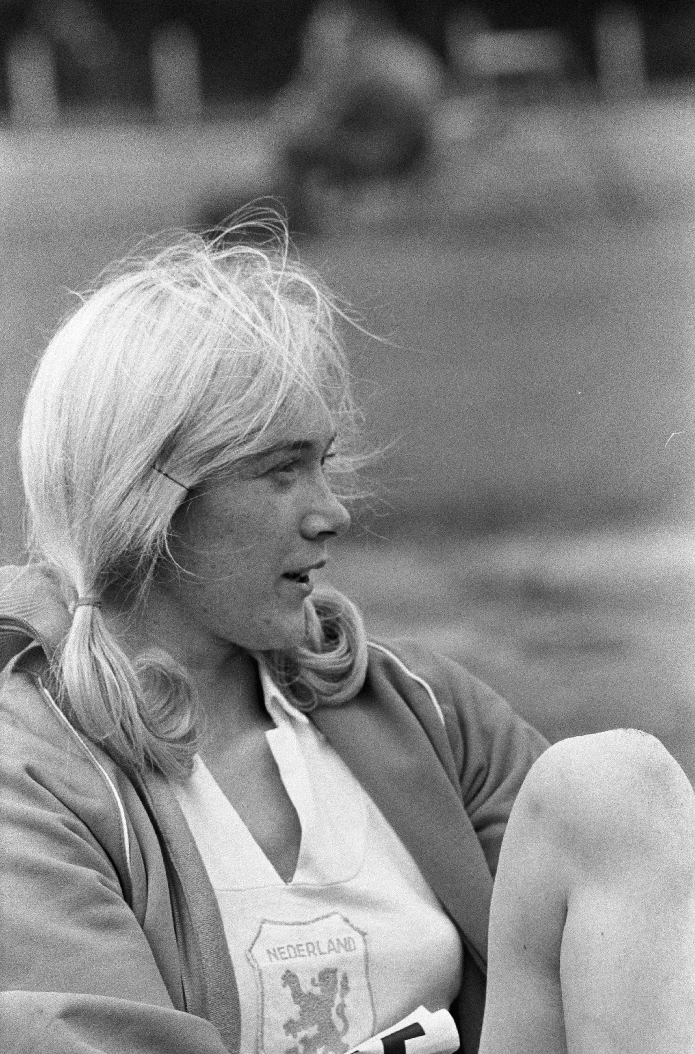 Collectie / Archief : Fotocollectie Anefo Reportage / Serie : [ onbekend ] Beschrijving : Atletiek, Corrie Bakker Datum : 15 augustus 1966 Trefwoorden : atletiek Persoonsnaam : Bakker, Corrie Fotograaf : Kroon, Ron / Anefo Auteursrechthebbende : Nationaal Archief Materiaalsoort : Negatief (zwart/wit) Nummer archiefinventaris : bekijk toegang 2.24.01.05 Bestanddeelnummer : 919-4520